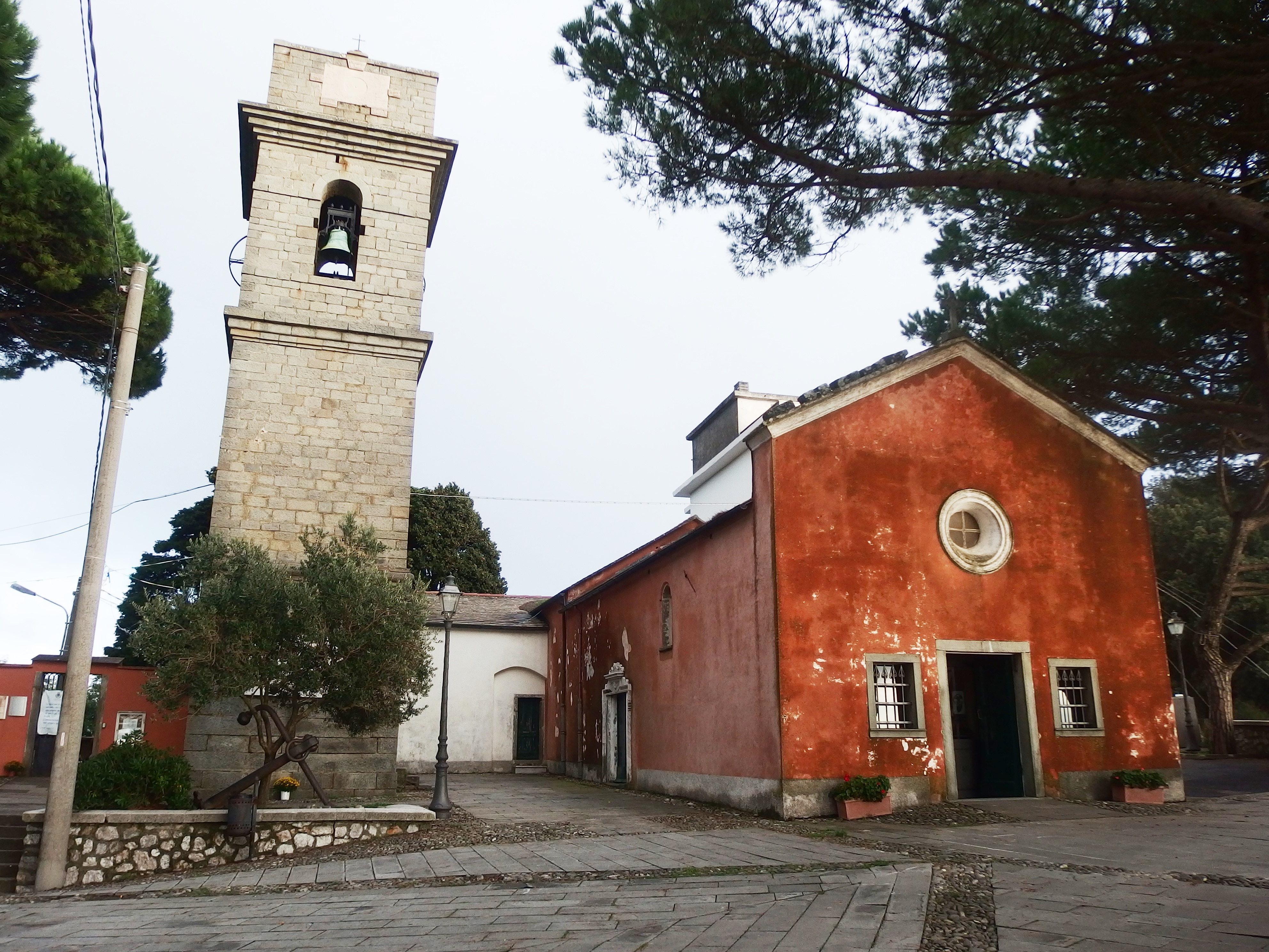 La Spezia, distretto cittadino Campiglia. Chiesa Cattolica Parrocchiale di Santa Caterina Vergine e Martire.